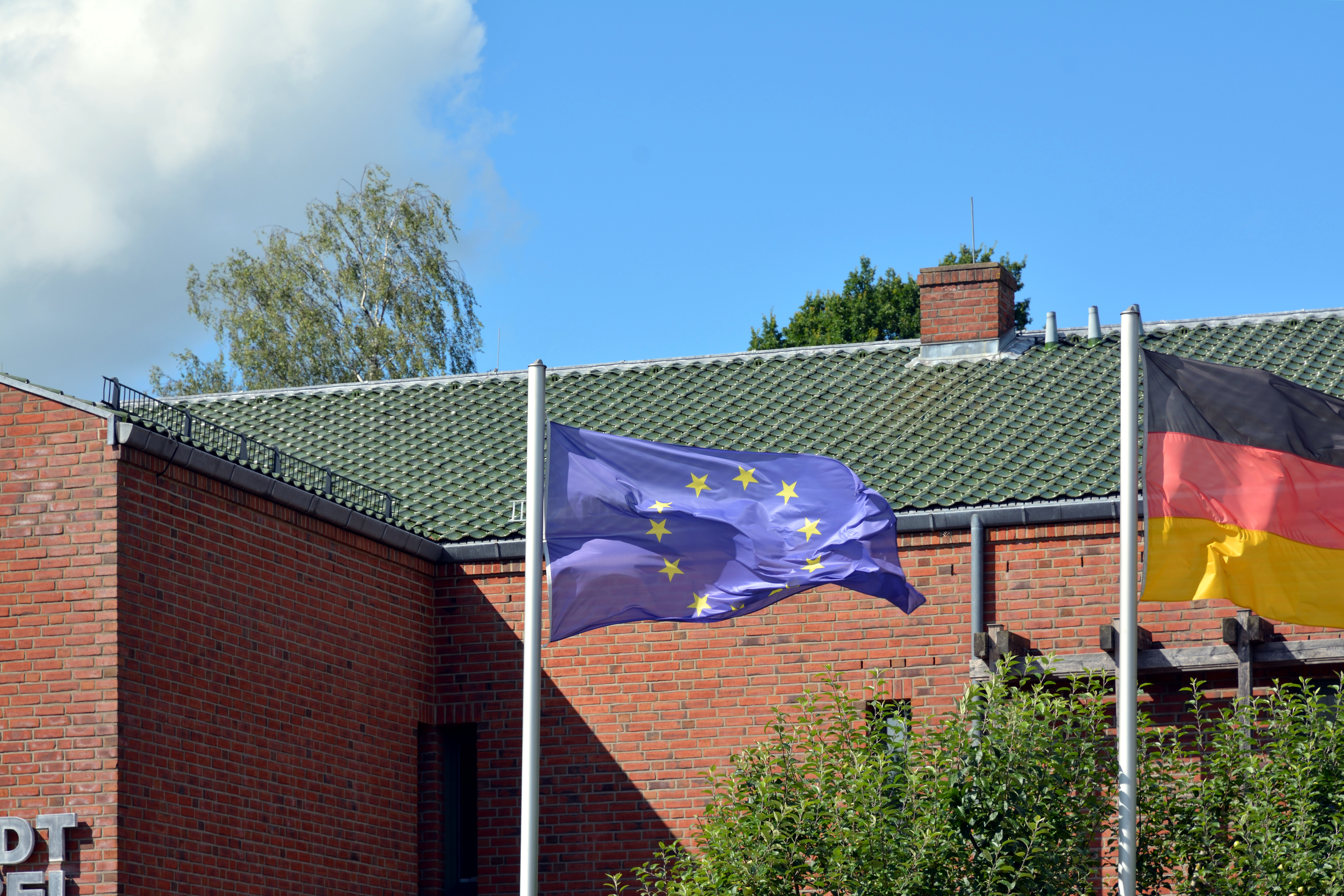 Die Europaflagge vor dem Museum in Kellinghusen. Sie wurde falsch herum aufgehängt, die Sterne zeigen mit den Spitzen nach unten.